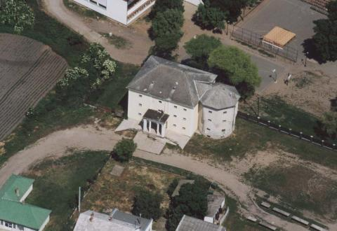 Kállósemjén, Hungary, aerial photography